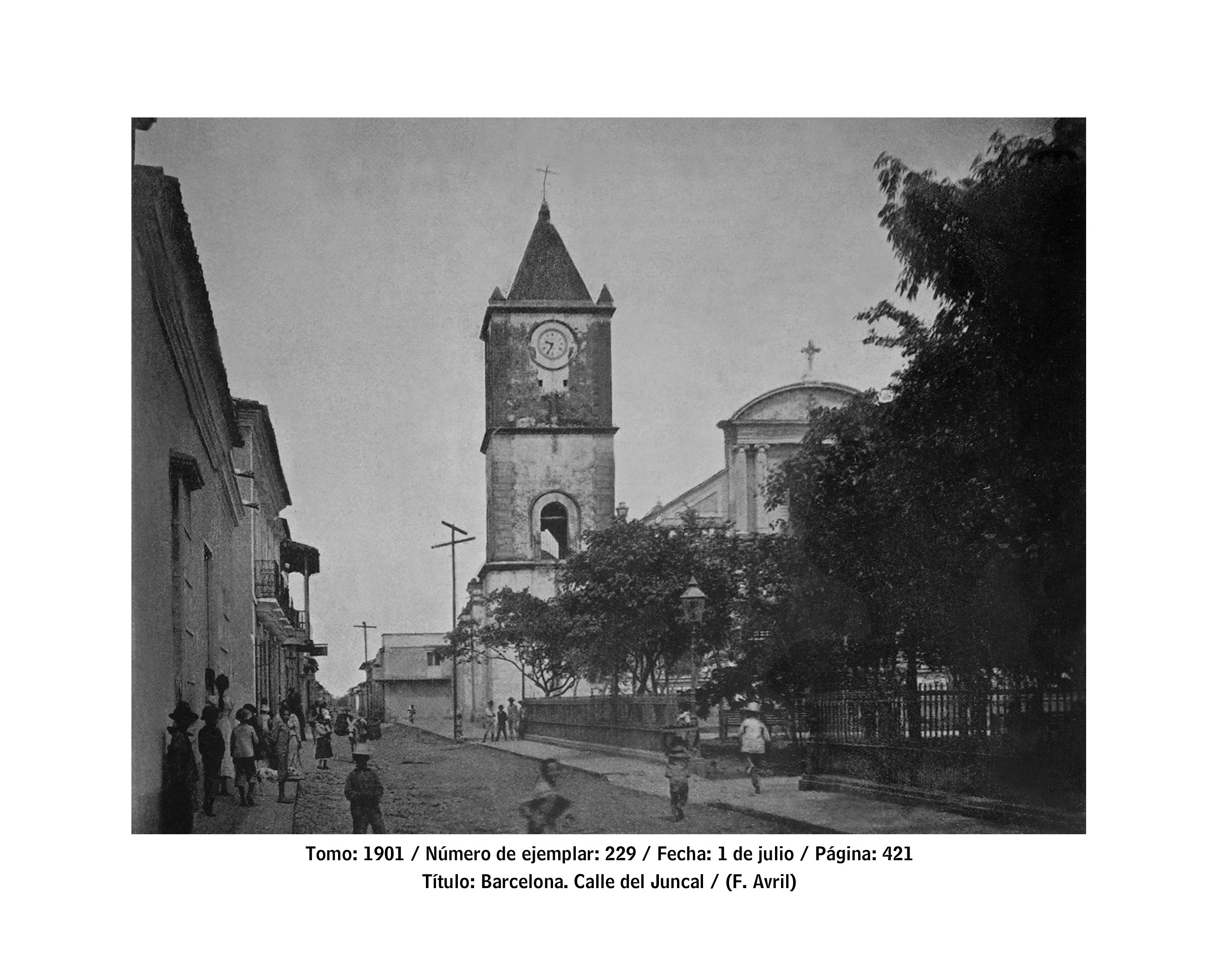 Calle del Juncal en barcelona